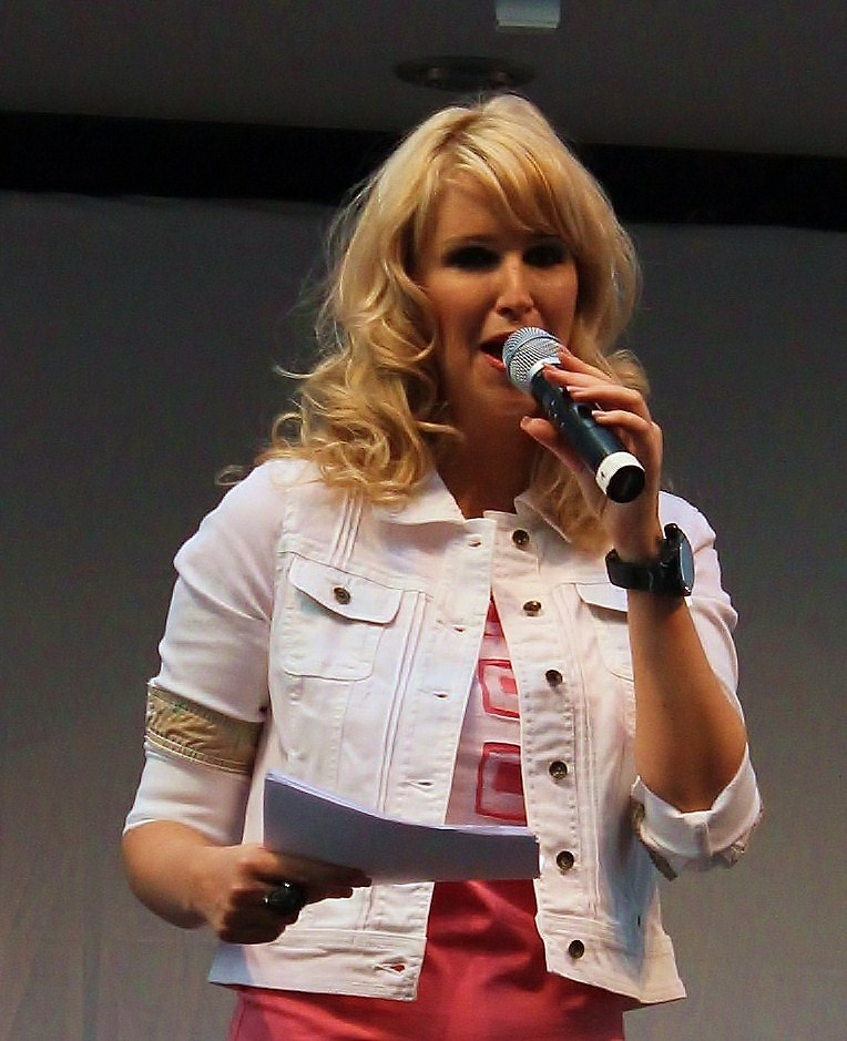 Claudia Lässer als Moderatorin an einer Modeschau.